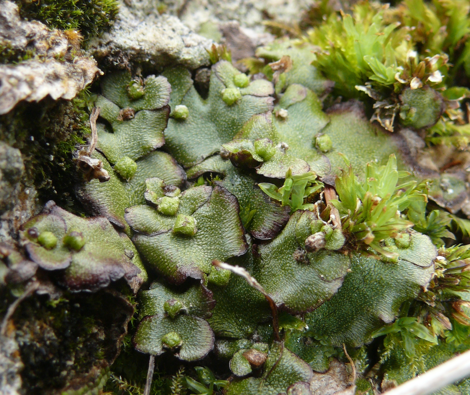 Preissia quadrata, Schwäbische Alb, Germany